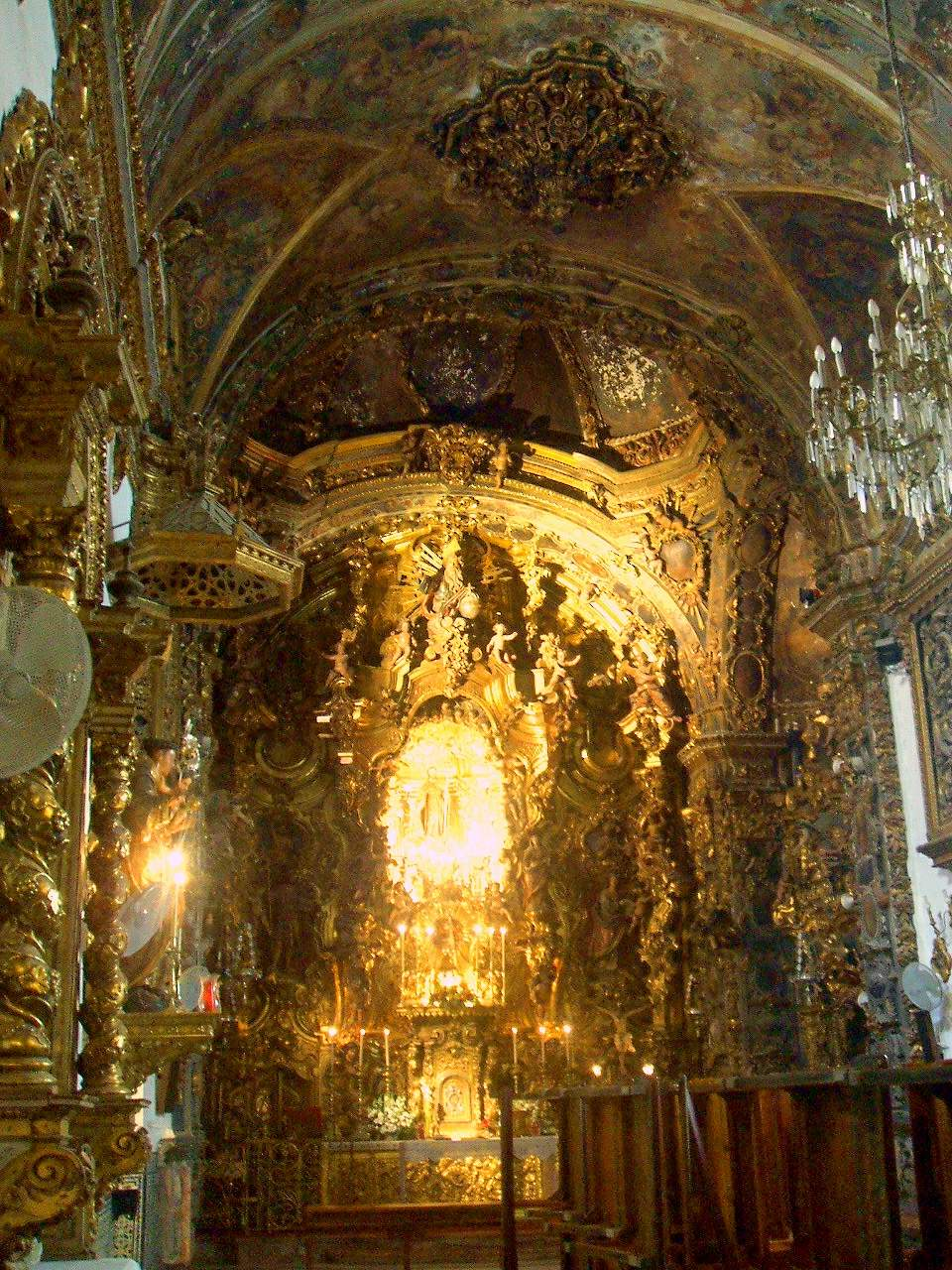 Capilla de San José, Sevilla